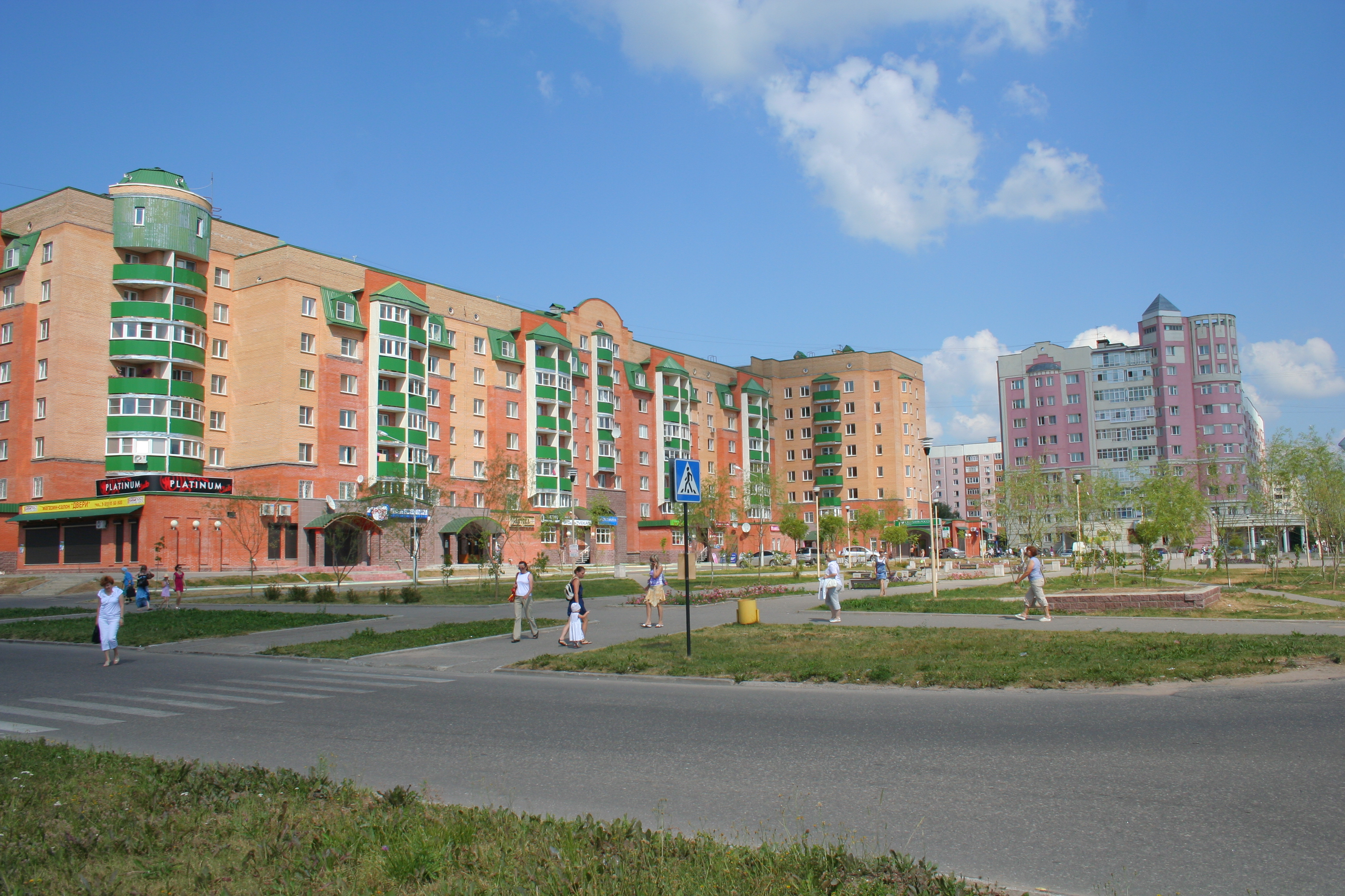 Stadt Udomlja (Oblast Twer, Russland). Zentraler Platz der Stadt.